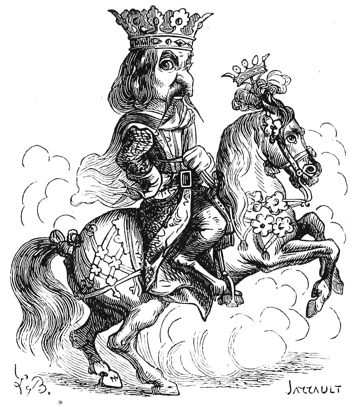 Illustration du Dictionnaire infernal de Jacques Auguste Simon Collin de Plancy par Louis Le Breton, 6eme édition, 1863.